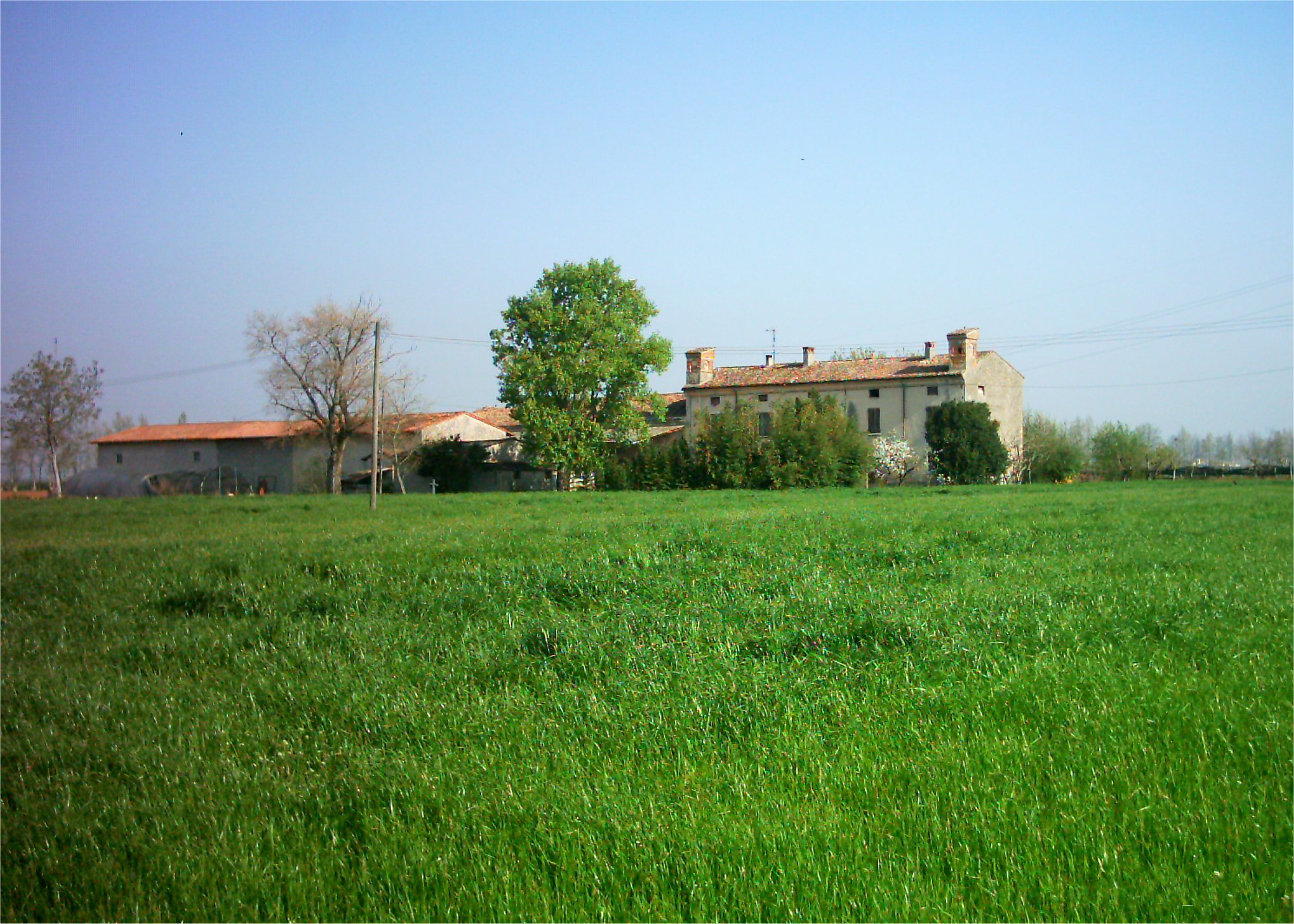 Cascina "Casa Nuova", luogo di scontro della Battaglia di Medole, nell'ambito della Grande Battaglia di Solferino e San Martino, tra la 1ª Armata Austriaca di Wimpffen ed il 4º Corpo d'armata di Niel, il 24 giugno 1859. Veduta dal fronte austriaco. Coordinate geografiche: 45.326616,10.552896